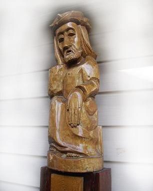 RUPINTOJELIS.MANO KIEMAS